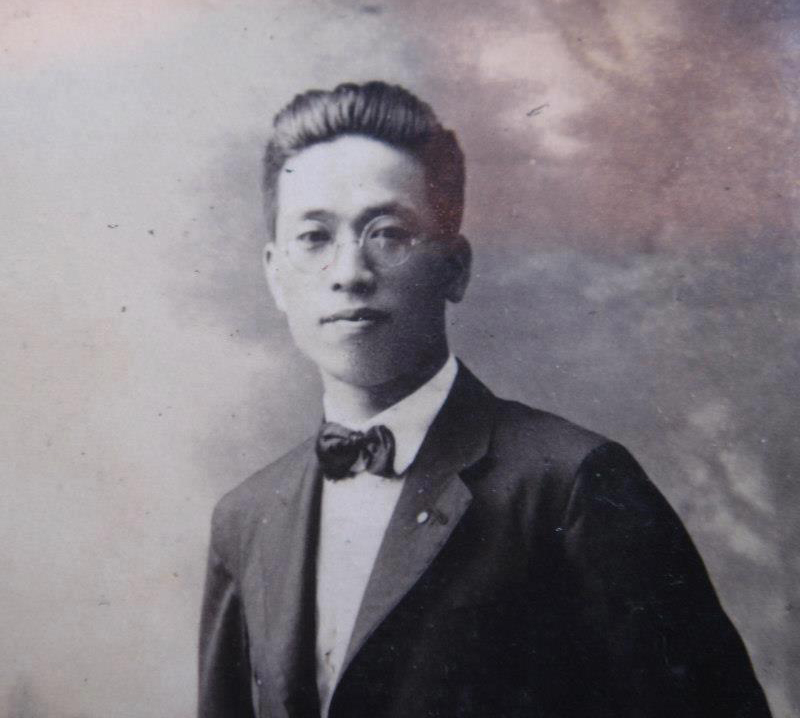 セルフポートレート